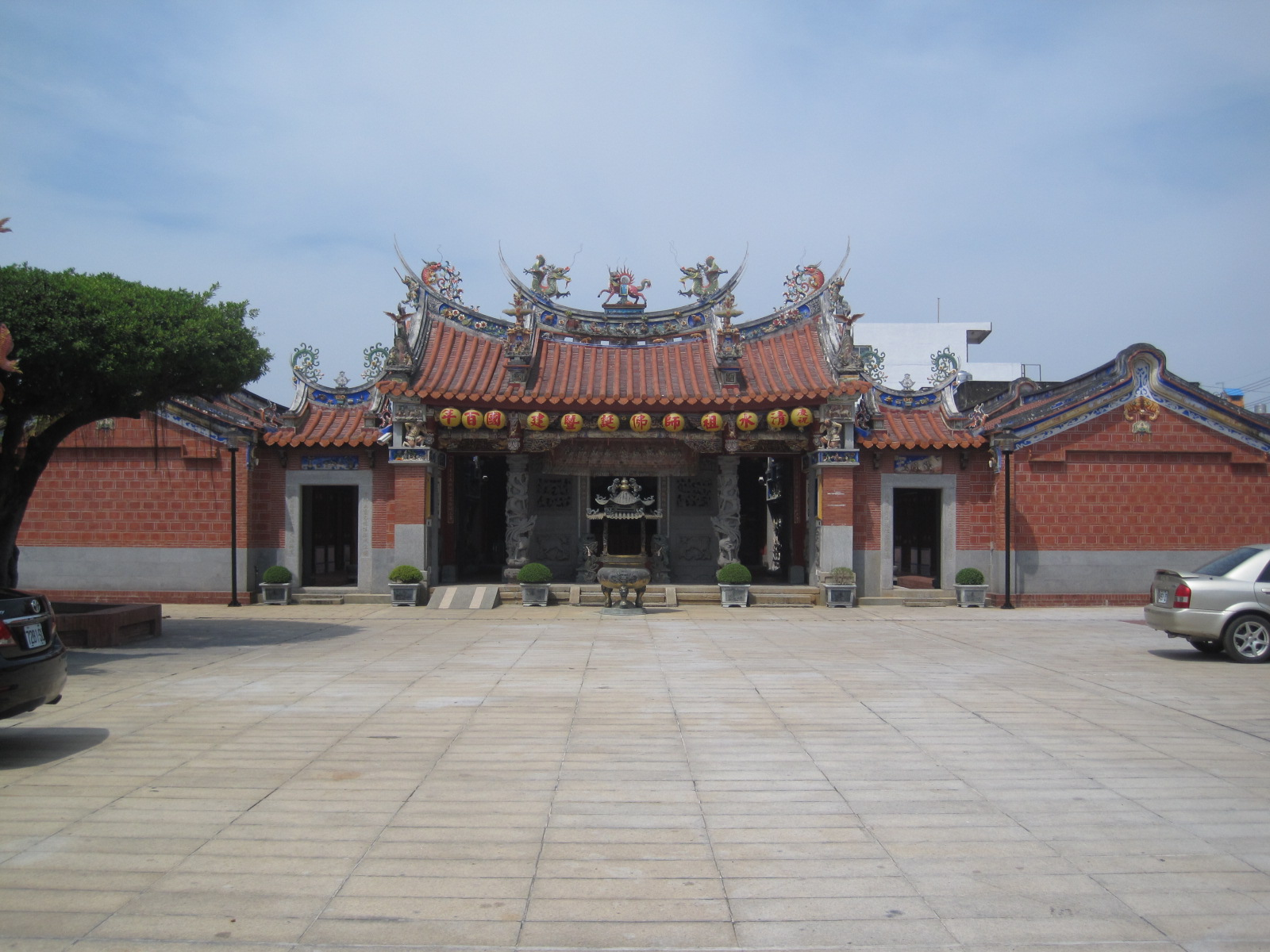 臺南市佳里區佳里興的震興宮，為市定古蹟。